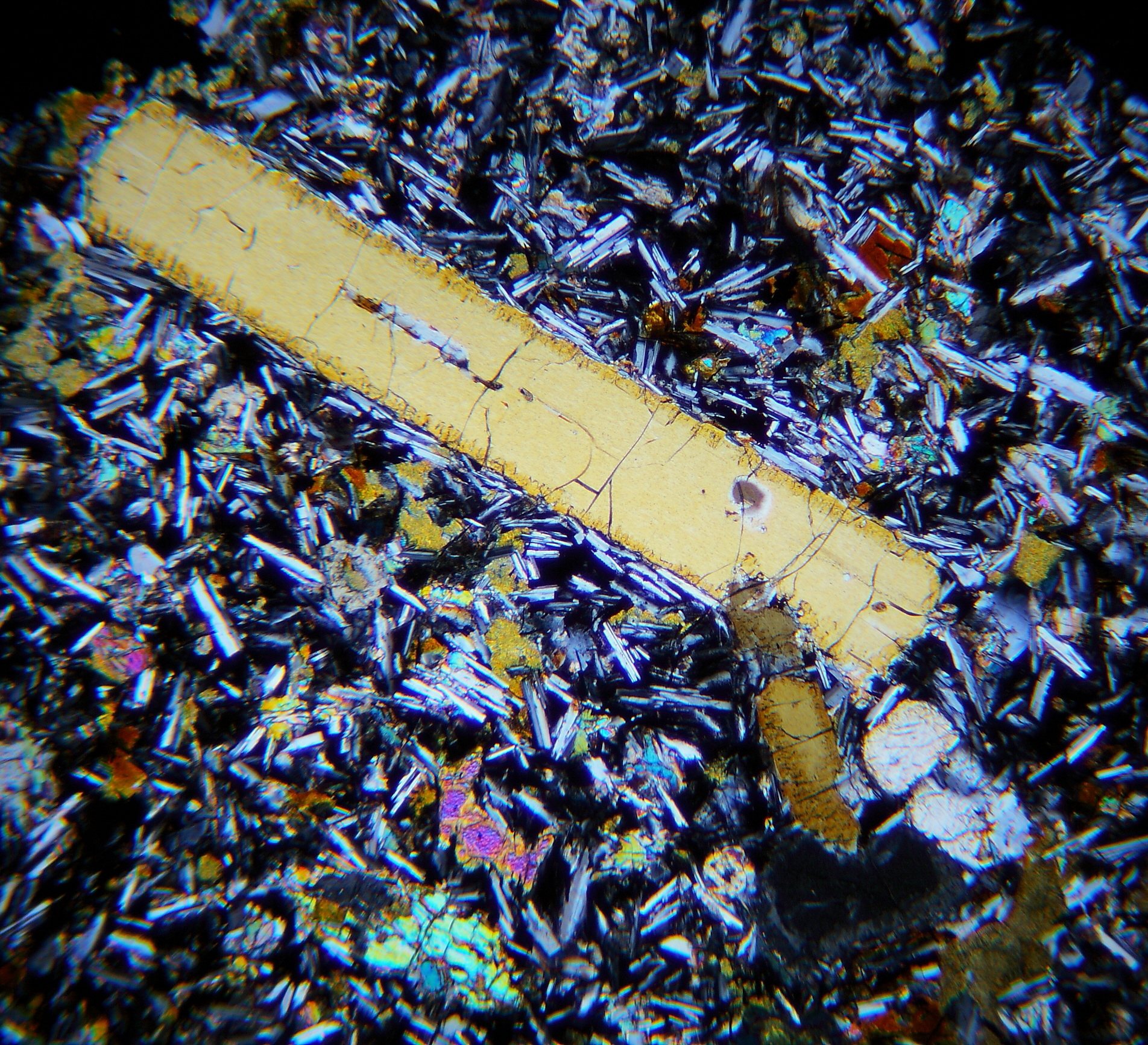 Enstatitkristalle in tholeiitischem Basalt aus dem vorderen Vogelsberg (Dünnschliff, XPL)